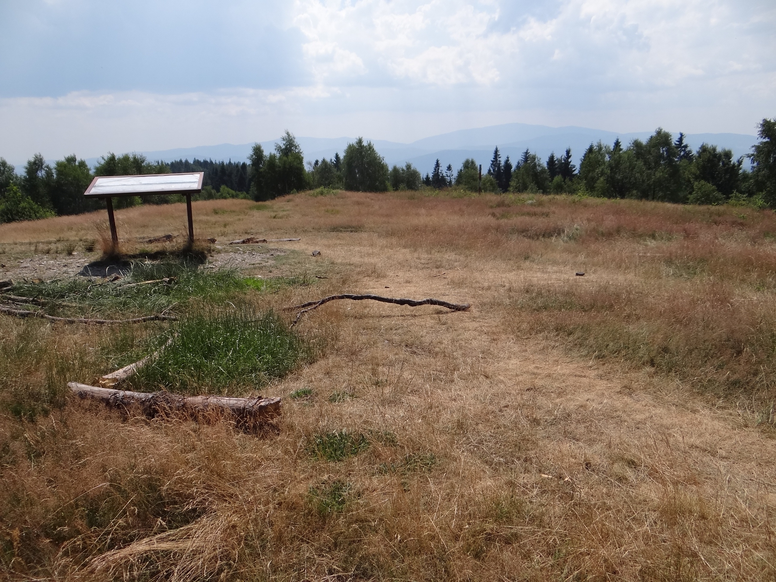 Polana widokowa na Leskowcu